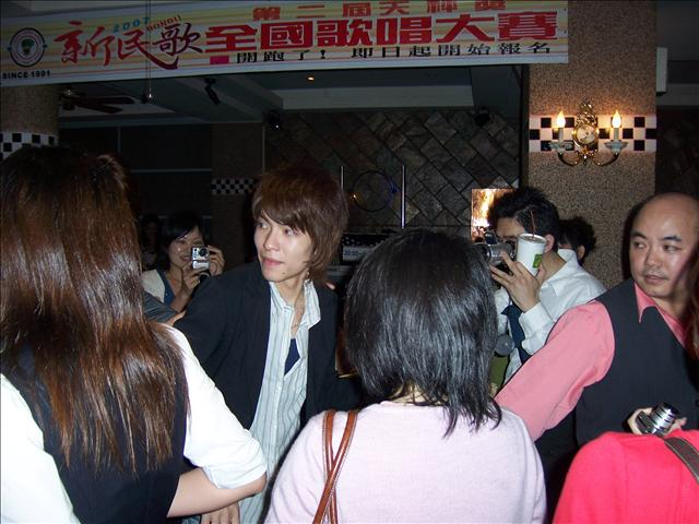 攝於2007年天秤座餐廳